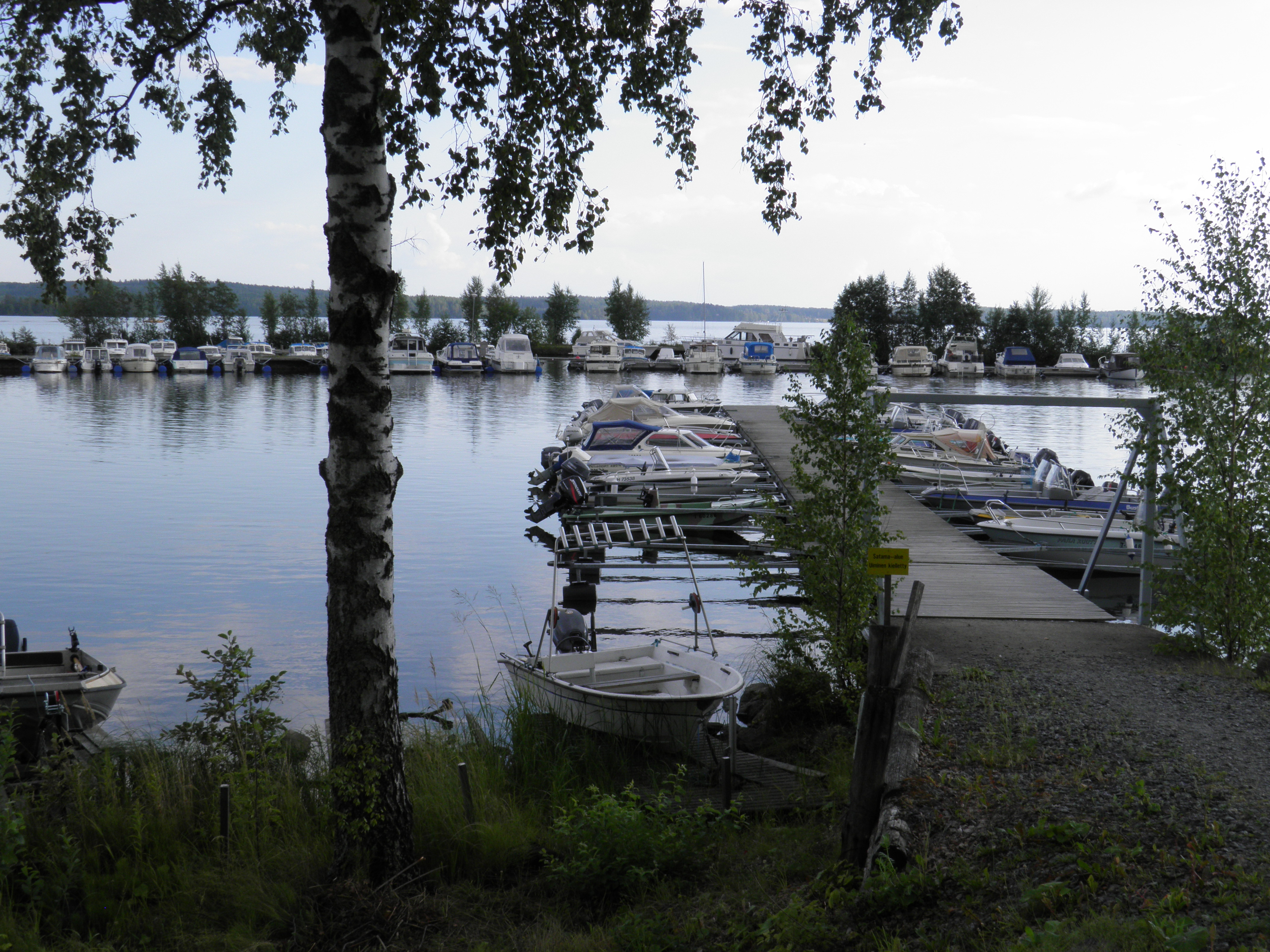 Viholan venesatamaa Nokialla.